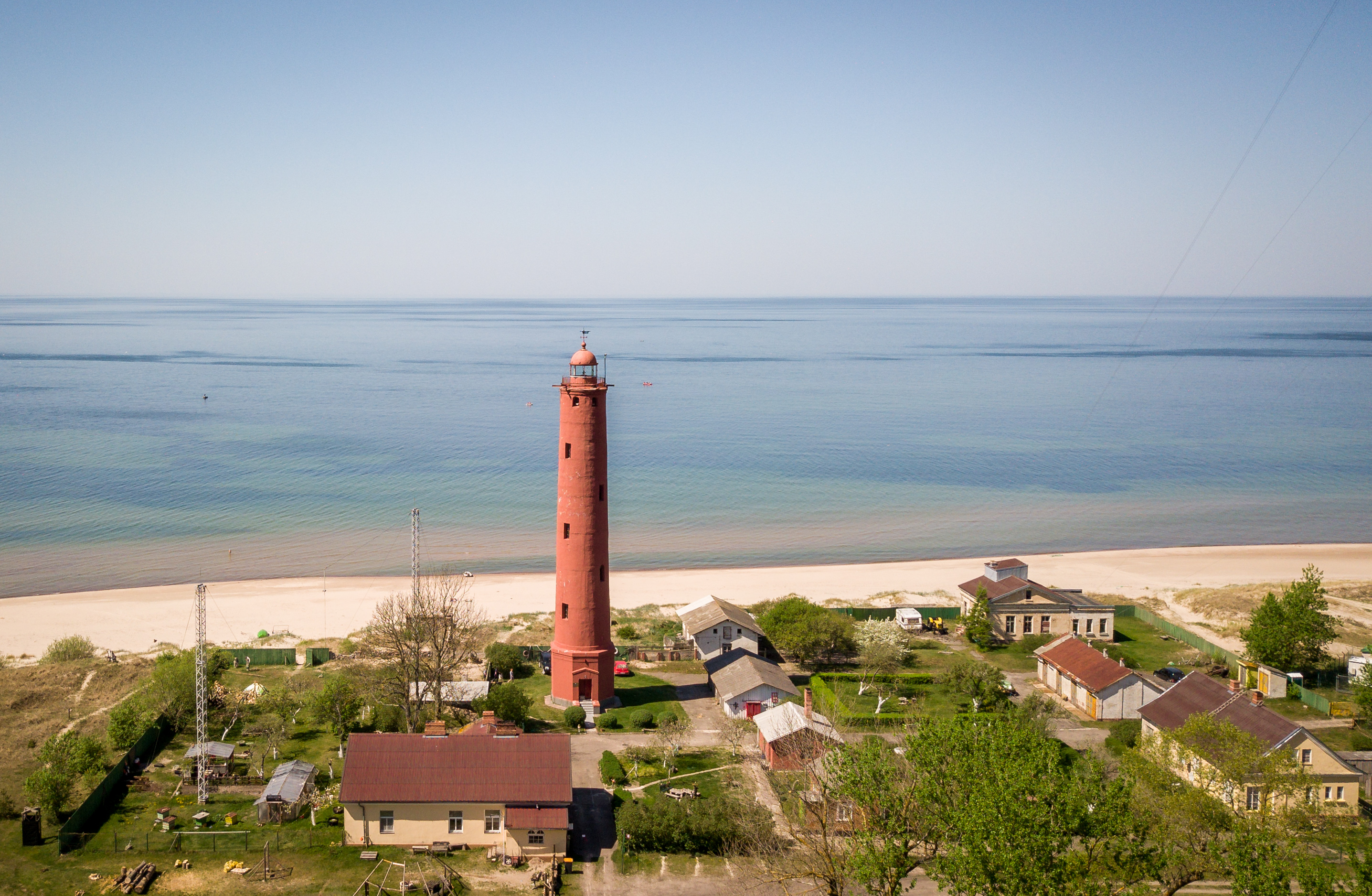 Akmeņraga bāka, Sakas pagasts